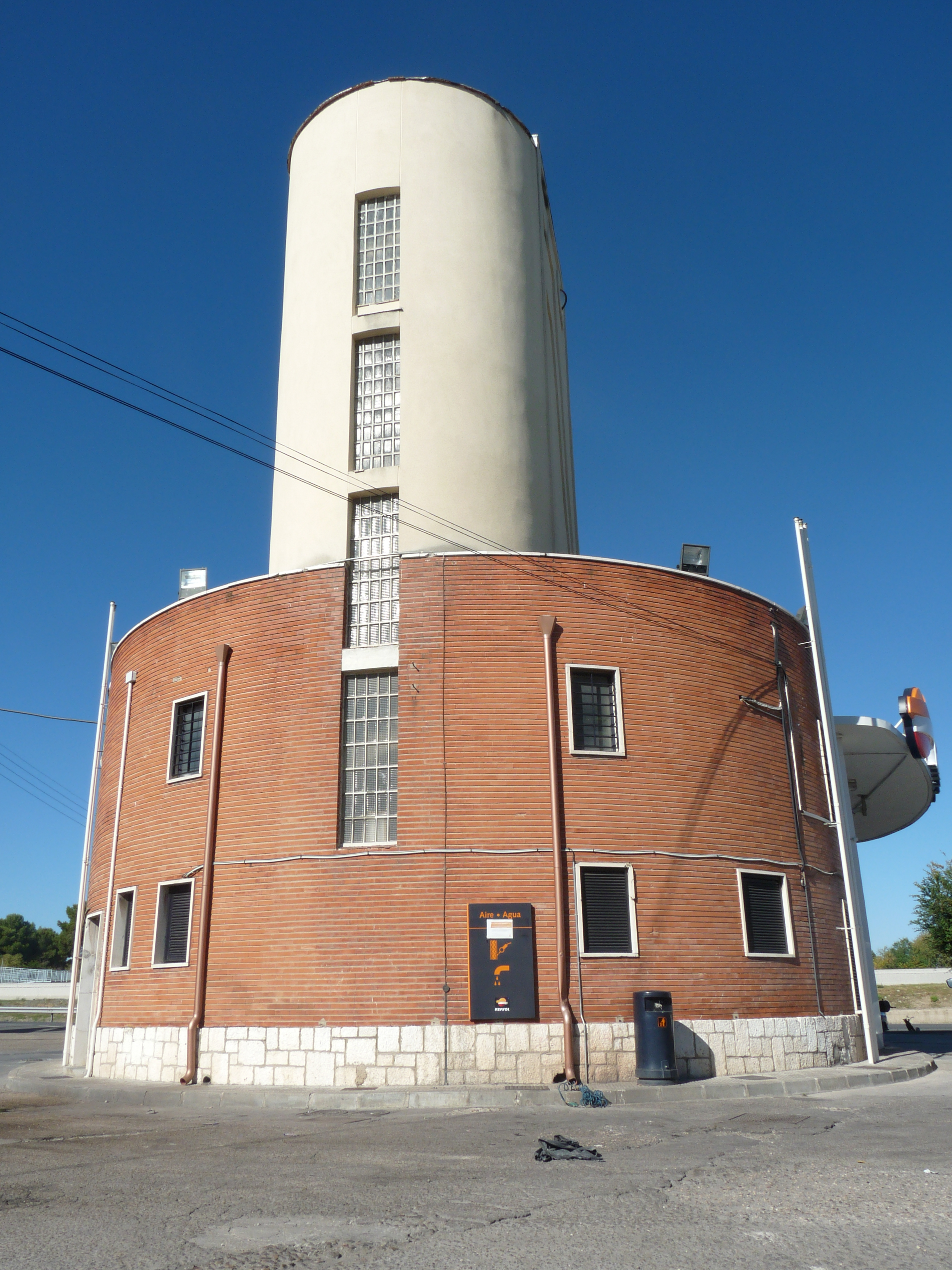 Gasolinera en el número 288 de la avenida de Aragón, Madrid.